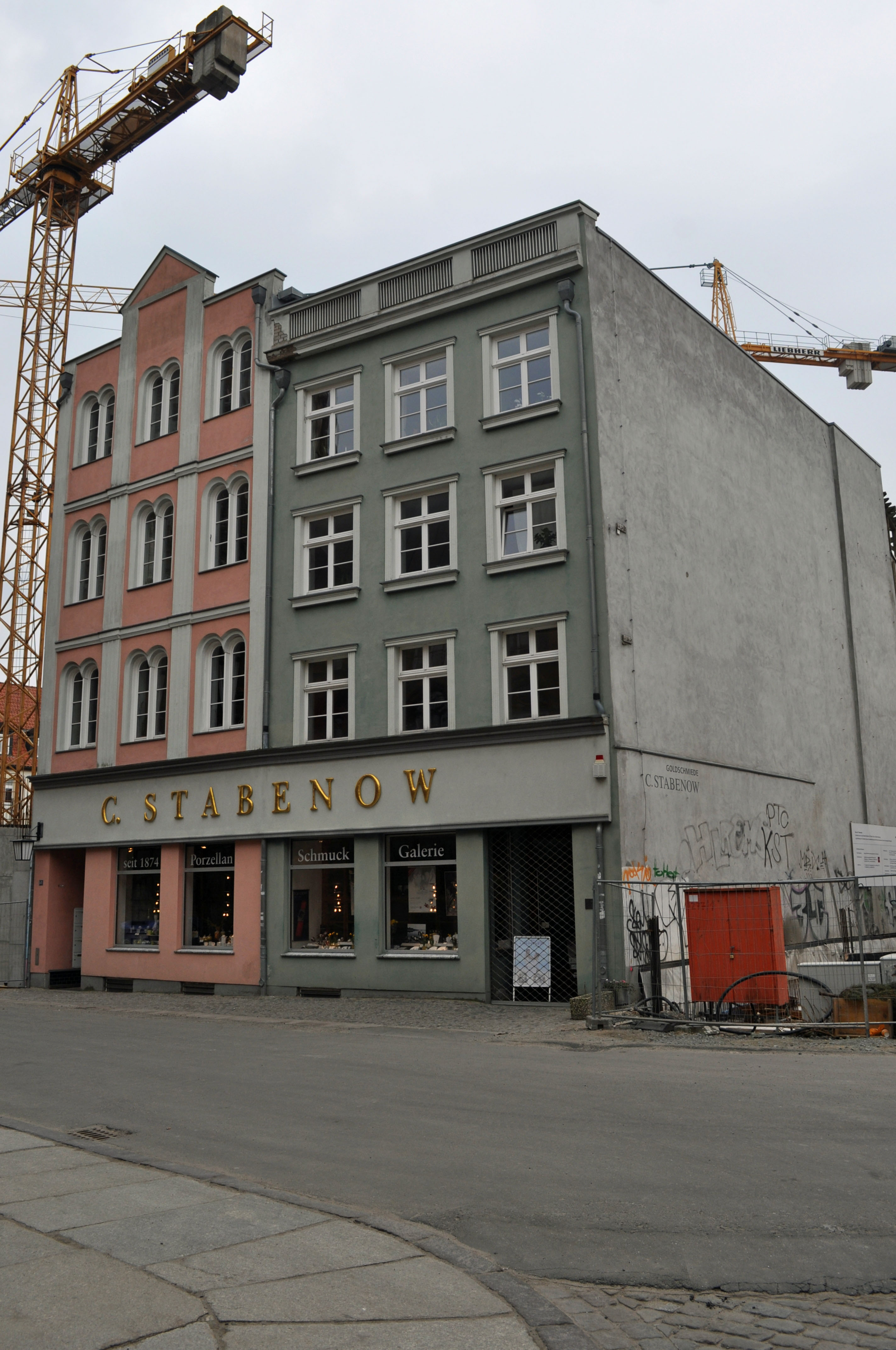 Gebäude bzw. Gebäudedetail in Stralsund. Straße und Hausnummer siehe Dateiname.